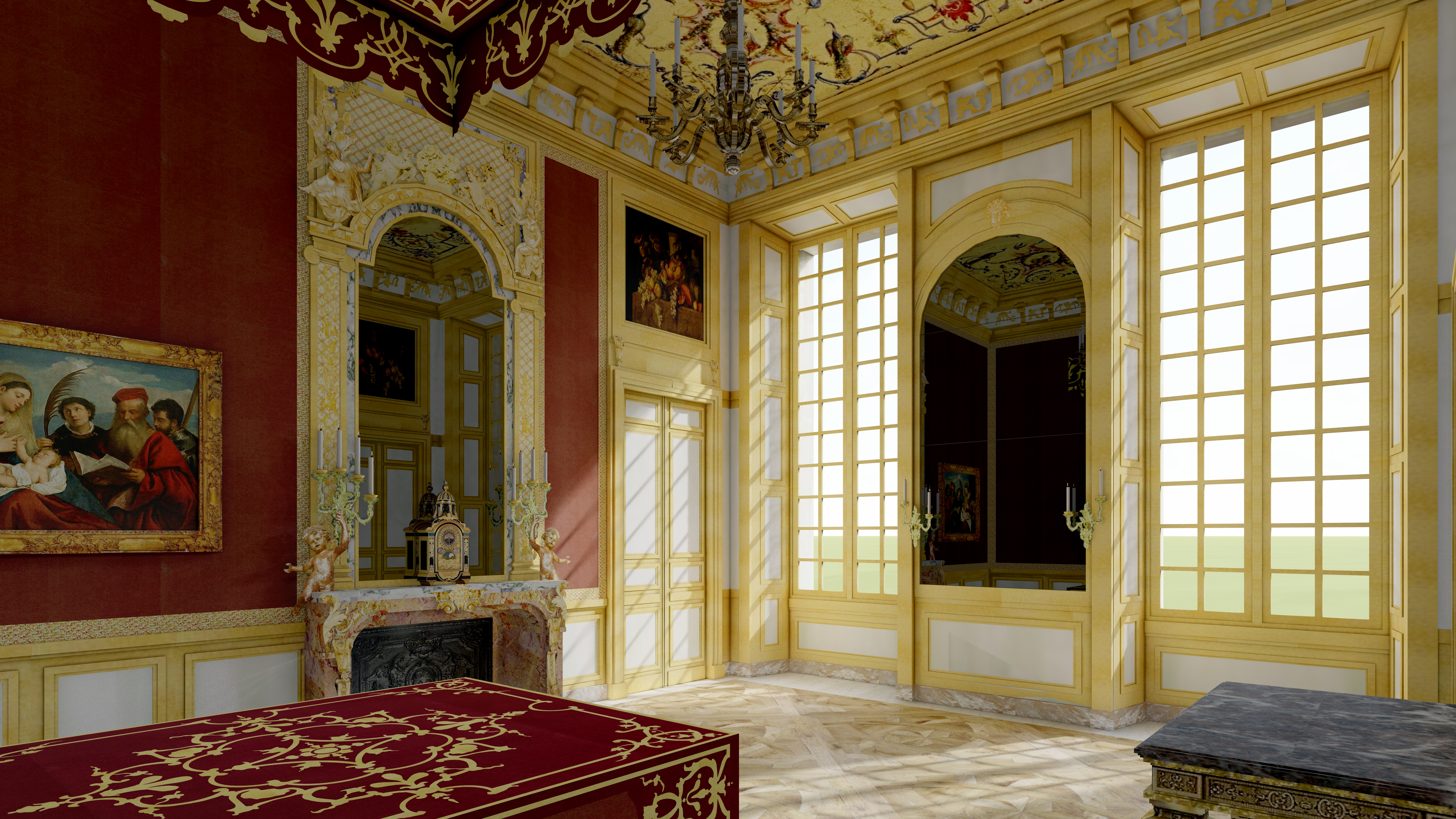 Essai de restitution de la chambre de Monseigneur, Grand Appartement du rez-de-chaussée de l'aile est. Vers 1700-1711.